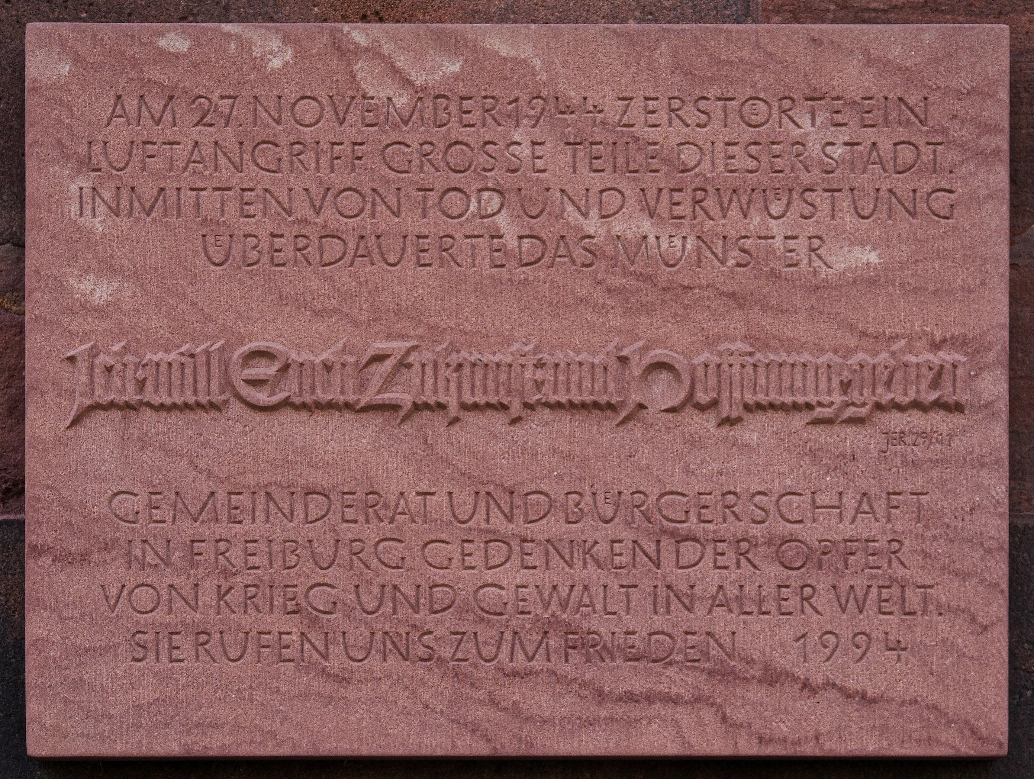 Gedanktafel an die Operation Tigerfish am Freiburger Münster